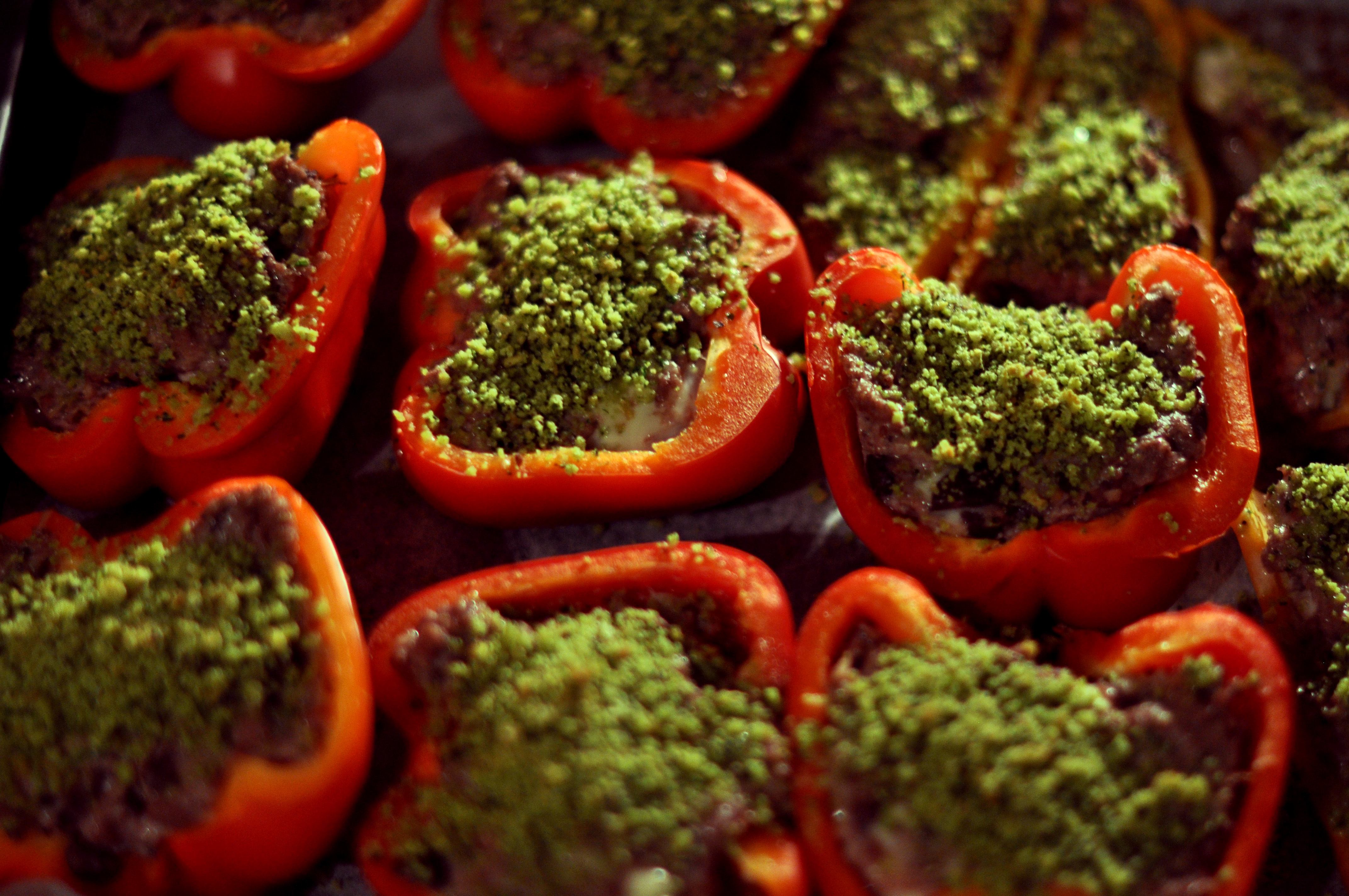 Farseret peberfrugt med oksekød, gorgonzola og oliven